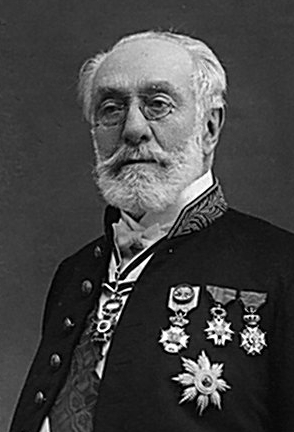 Édouard Otlet en 1887.